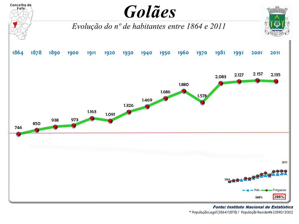 Censos 1864/2011